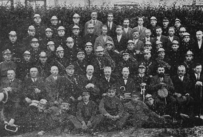 Powiatowy kurs pożarnictwa w Sanoku (3-6 lipca 1928)